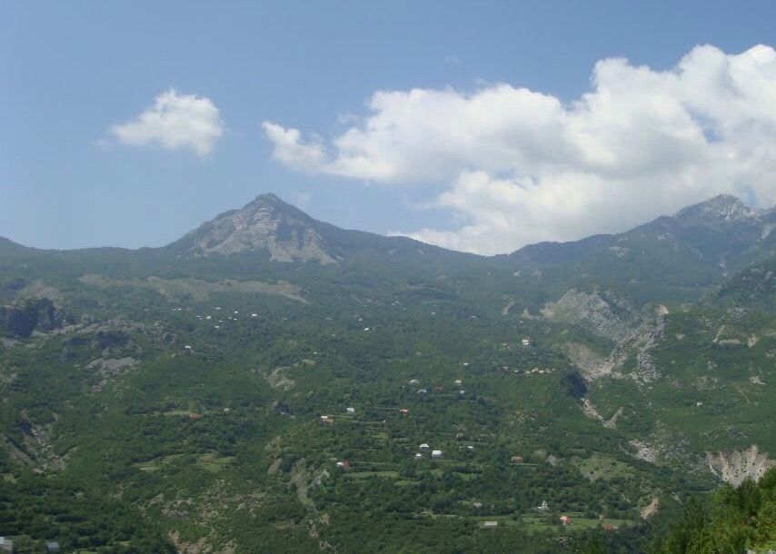 Gimaj Shalë